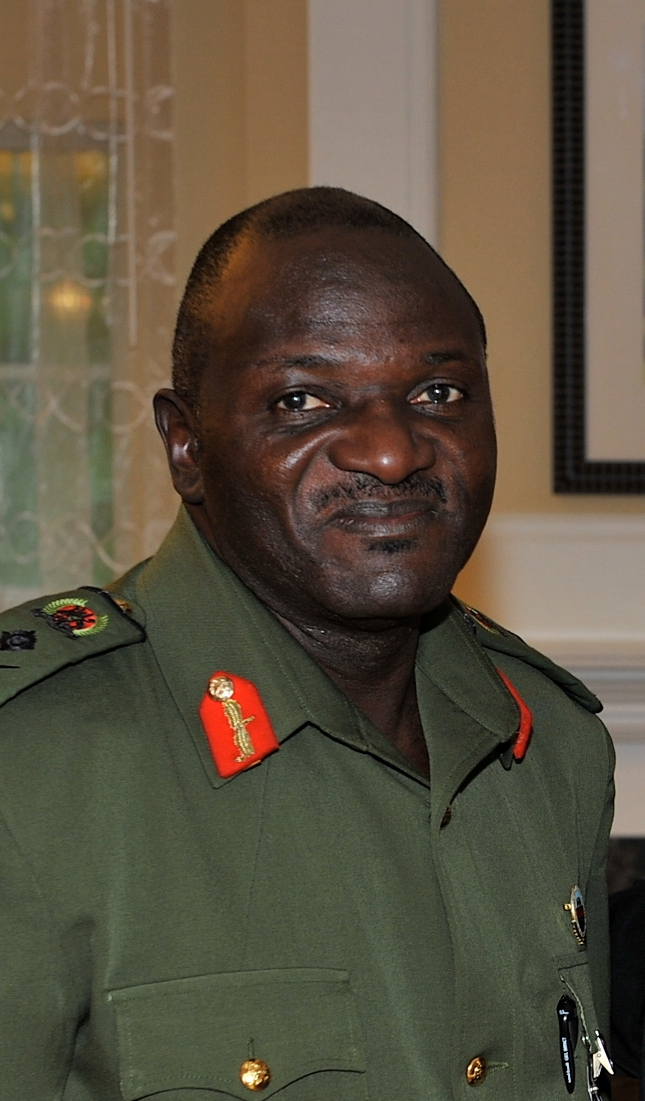 Lt. Gen. Katumba Wamala. U.S. Army photo by Barbara Romano